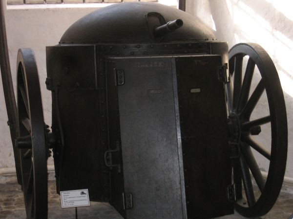 Transportabelt pansertårn (Gruson Werke: Fahr Panzer)